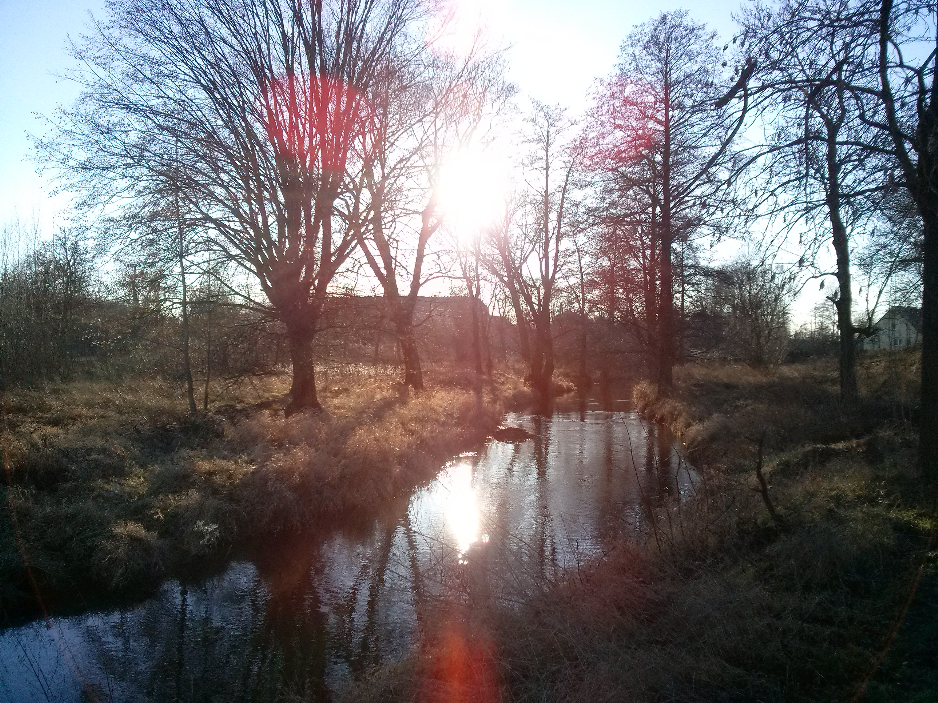 Krajobraz rzeki Skora w Wojcieszynie (woj. dolnośląskie)